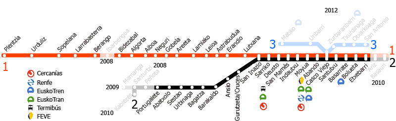 Mapa de red del metro de Bilbao (2007)